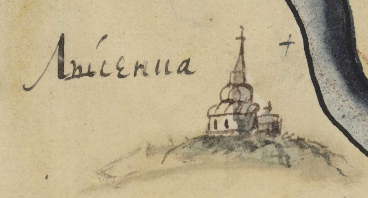 Фрагмент карти Київської губернії. XVIII століття. РГАДА, ф. 192, оп. 1, Киевская губ., № 5.